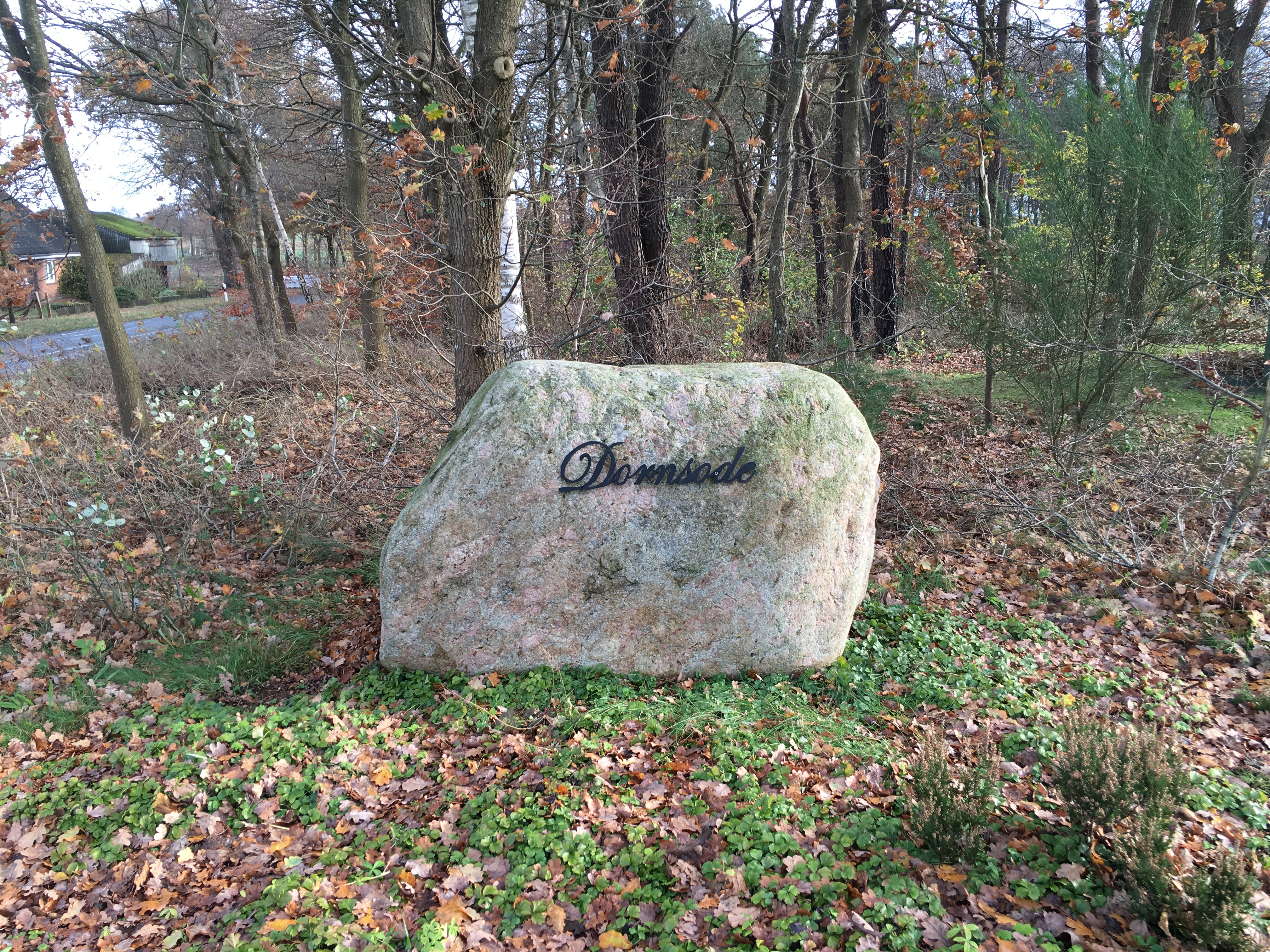 Steen in Doornsood